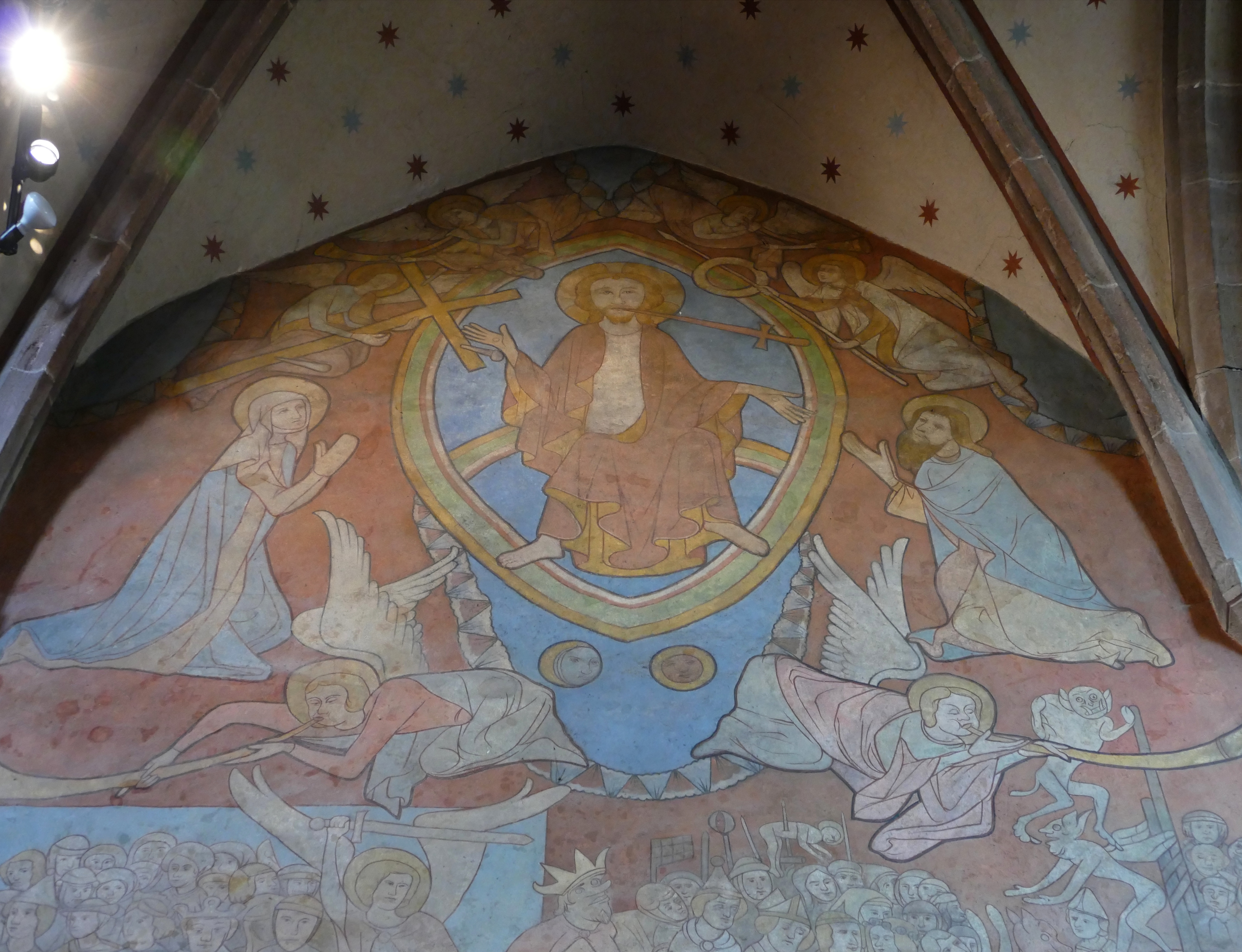 Alsace, Bas-Rhin, Rosenwiller, Église Notre-Dame de l'Assomption (PA00084907, IA00075624). Peintures murales (XIVe-XVe): Jugement dernier.